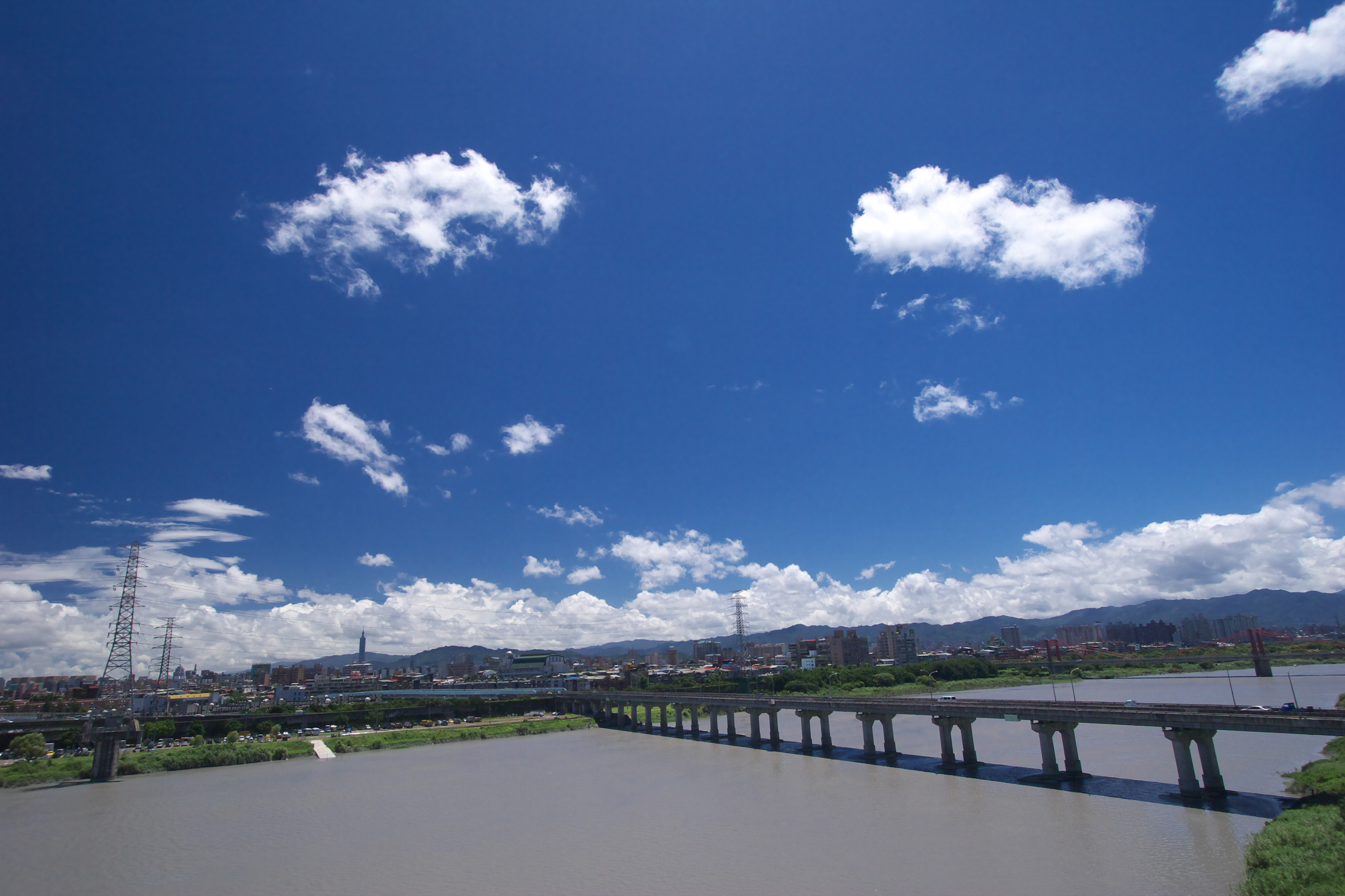 從萬板大橋望向華翠大橋所見到的天空景象